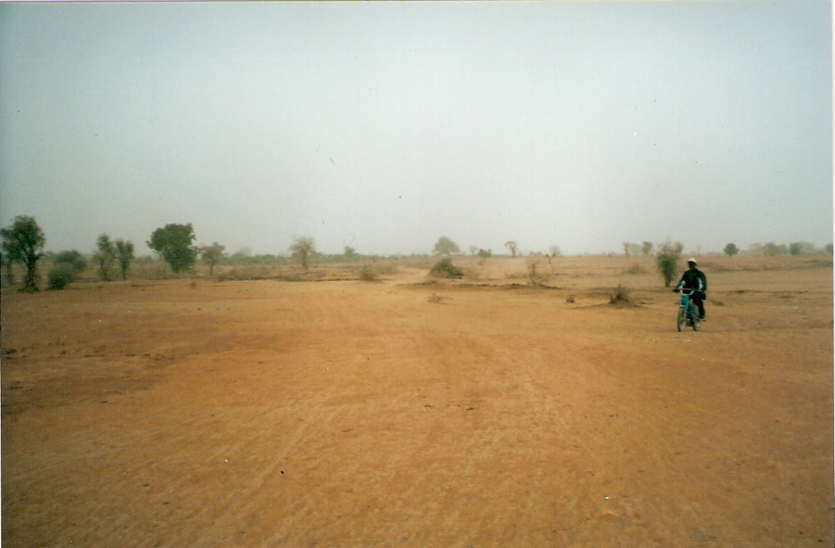 Paysage de la région de Kayes, au Mali, à la frontière avec le Sénégal